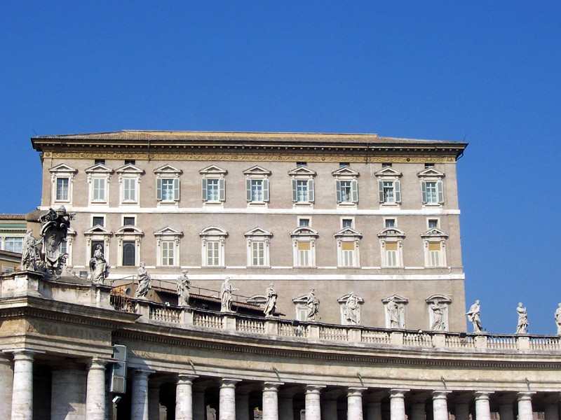 Città del Vaticano - Palazzo Apostolico